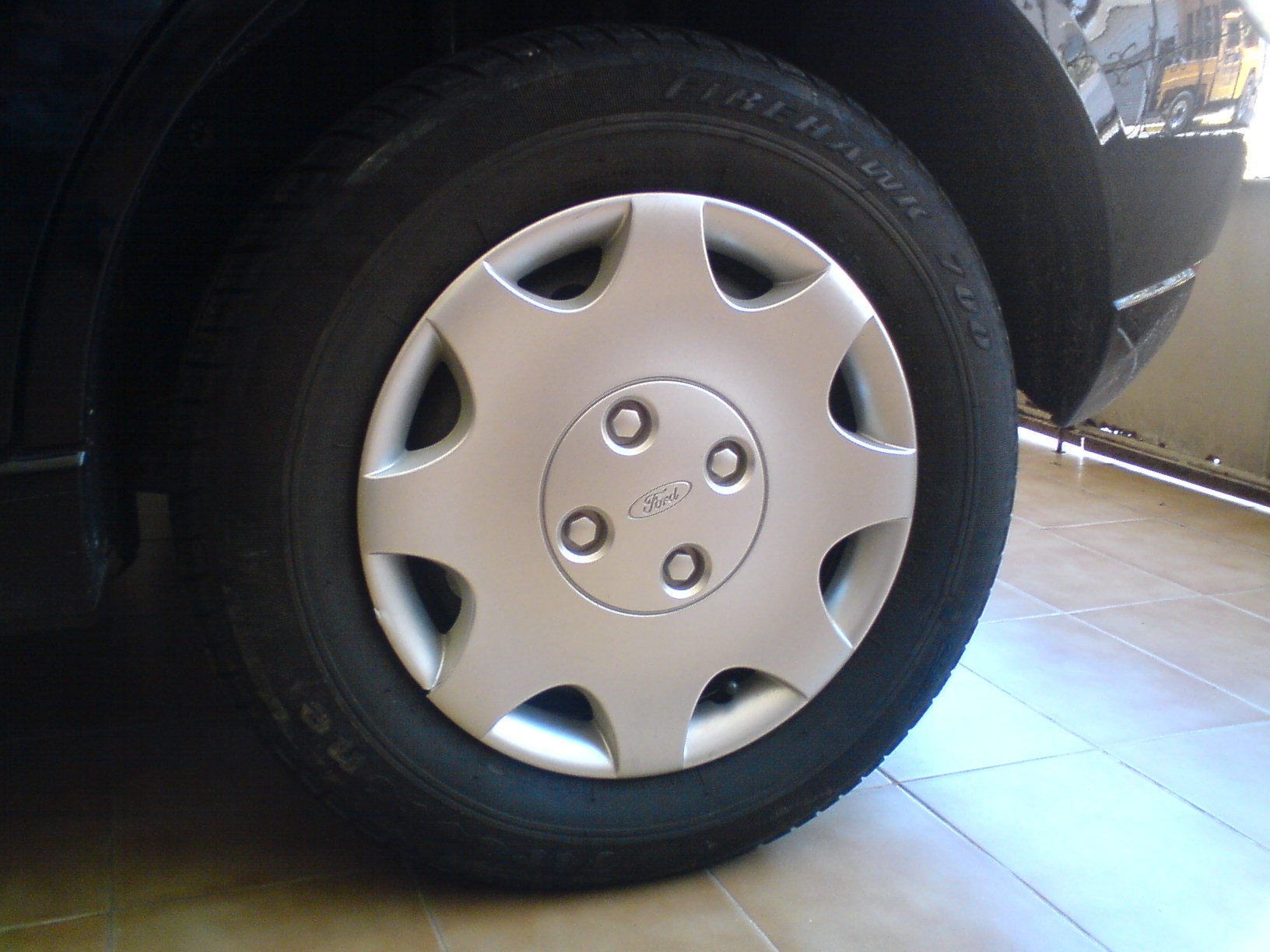 Calota (hubcap) plástica de pneu aro 14